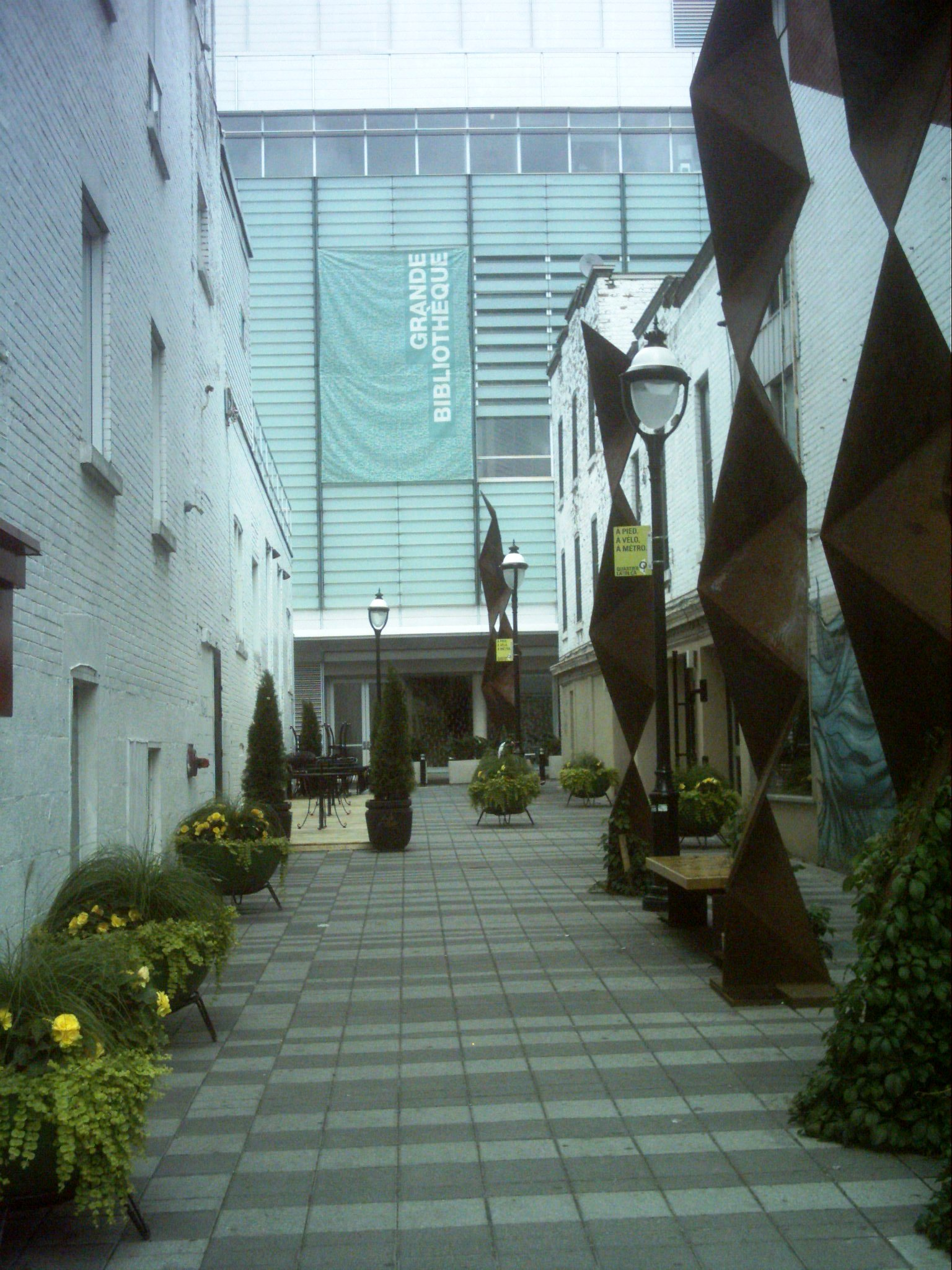 La Place Paul-Émile-Borduas vue de la rue Saint-Denis. Au fond: la Grande Bibliothèque du Québec.